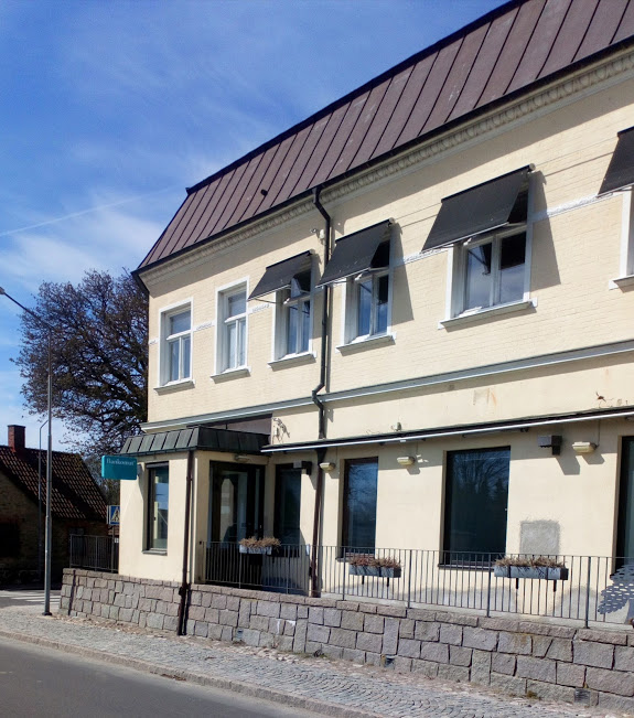 Löberöds bankhus vid torget